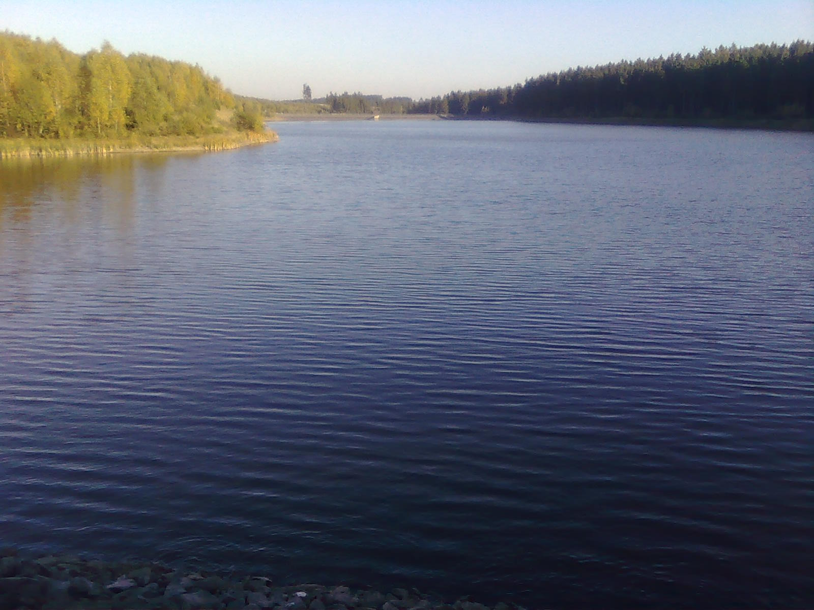 Blick von hinter der Teichmitte zum Damm - das Striegelhäuschen ist im Hintergrund erkennbar